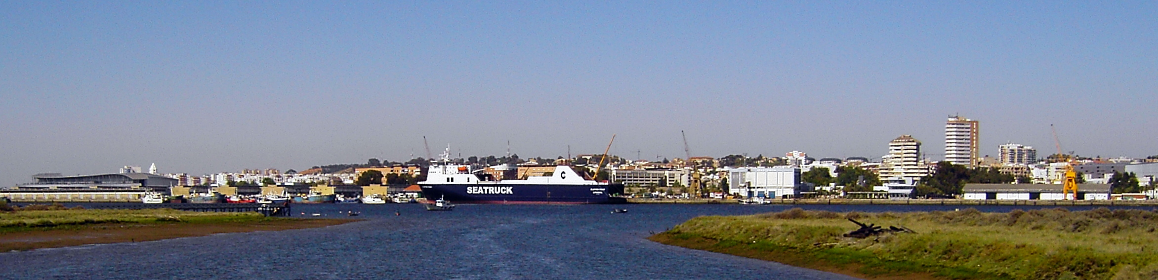 Puerto de Huelva (panorámica)